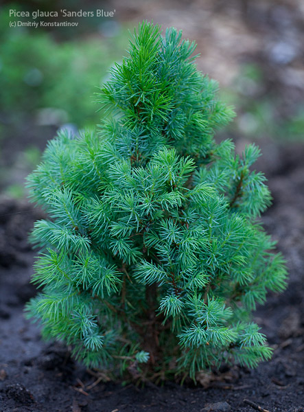 Россия, Владимирская область